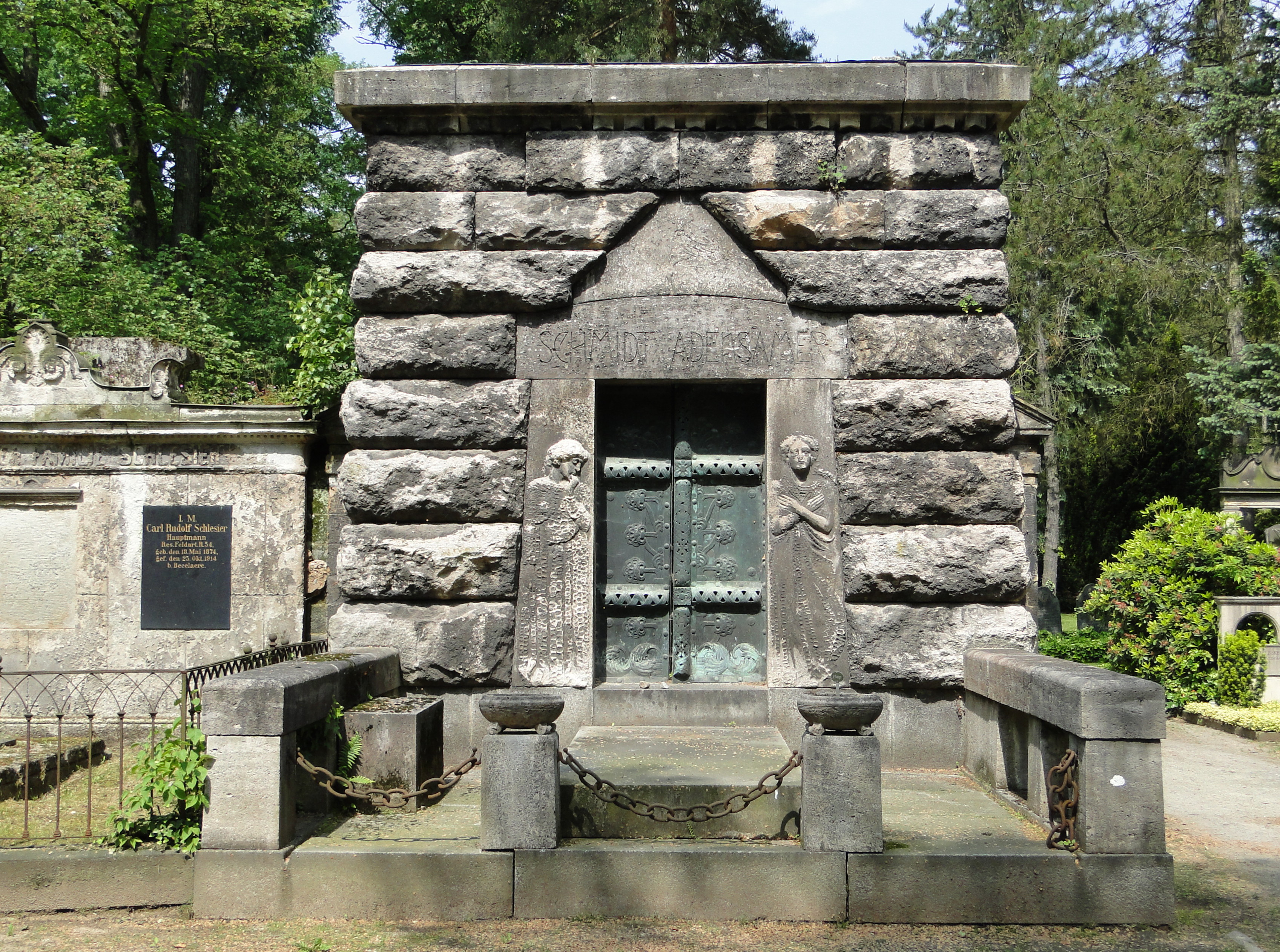 Grabstätte Schmidt Adensamer auf dem Johannisfriedhof in Dresden, Entwurf Arwed Roßbach, Ausführung Max Klinger